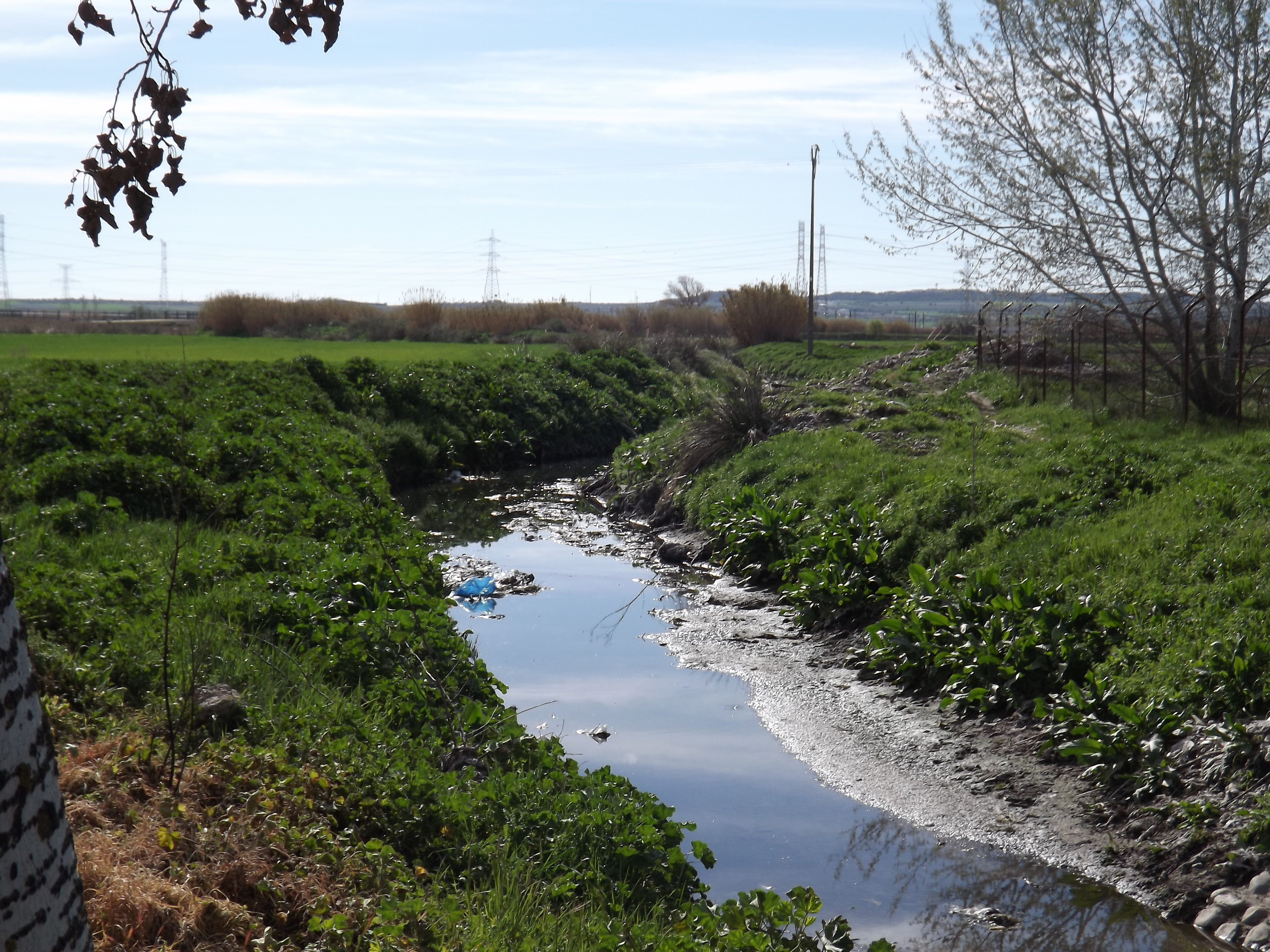 El arroyo de Humanejos (Guatén) a su salida de Parla en dirección a Torrejón de Velasco